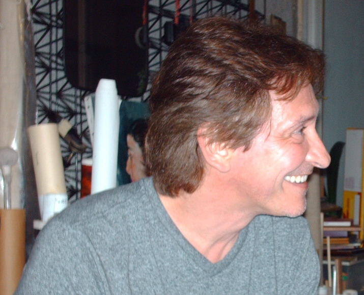 Bailarín Yanis Pikieris en una visita a Caracas el 19 de mayo de 2012